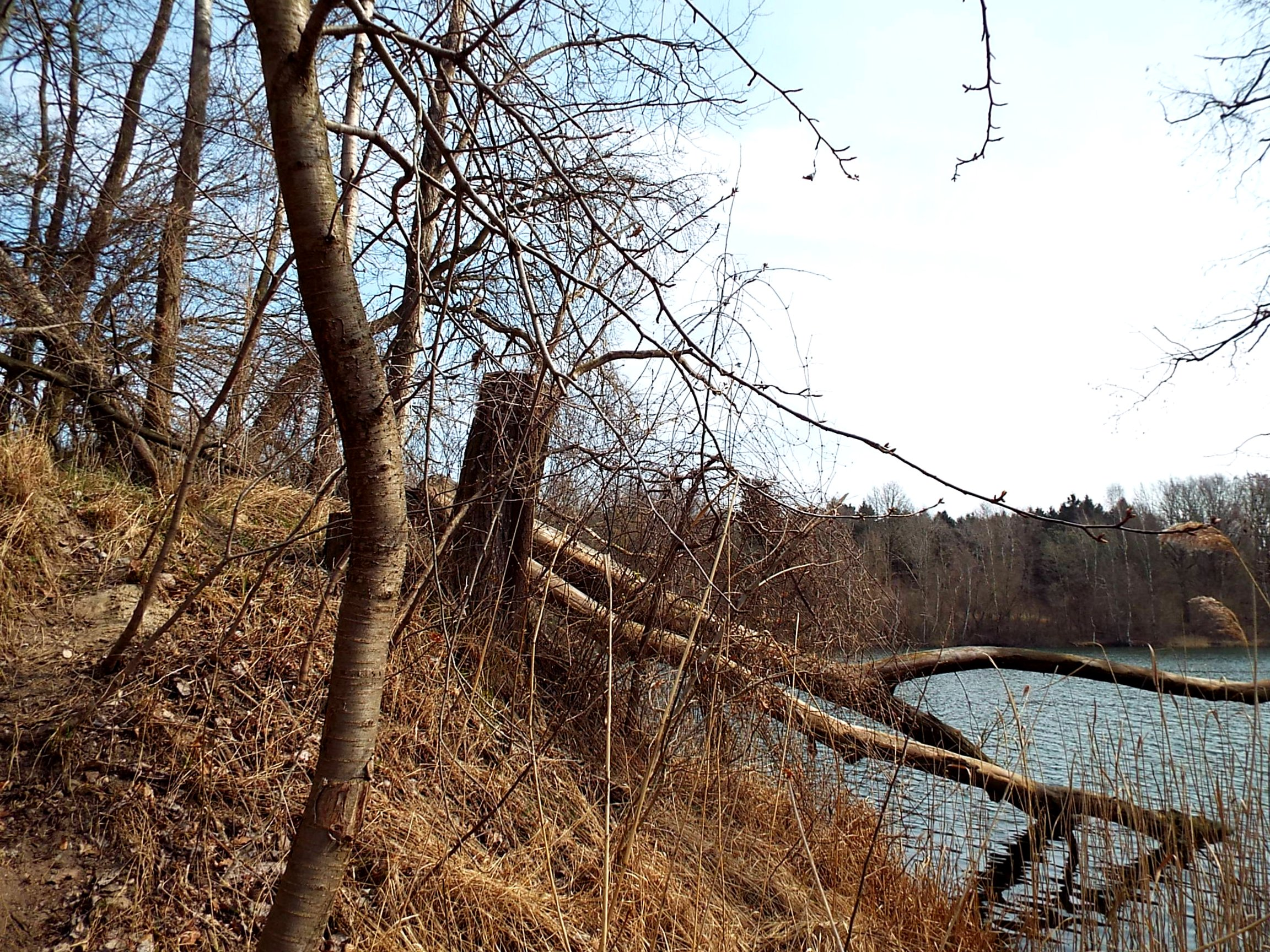 FFH-Gebiet DE-1645-302 „Kreidebruch bei Berglase“ auf Rügen